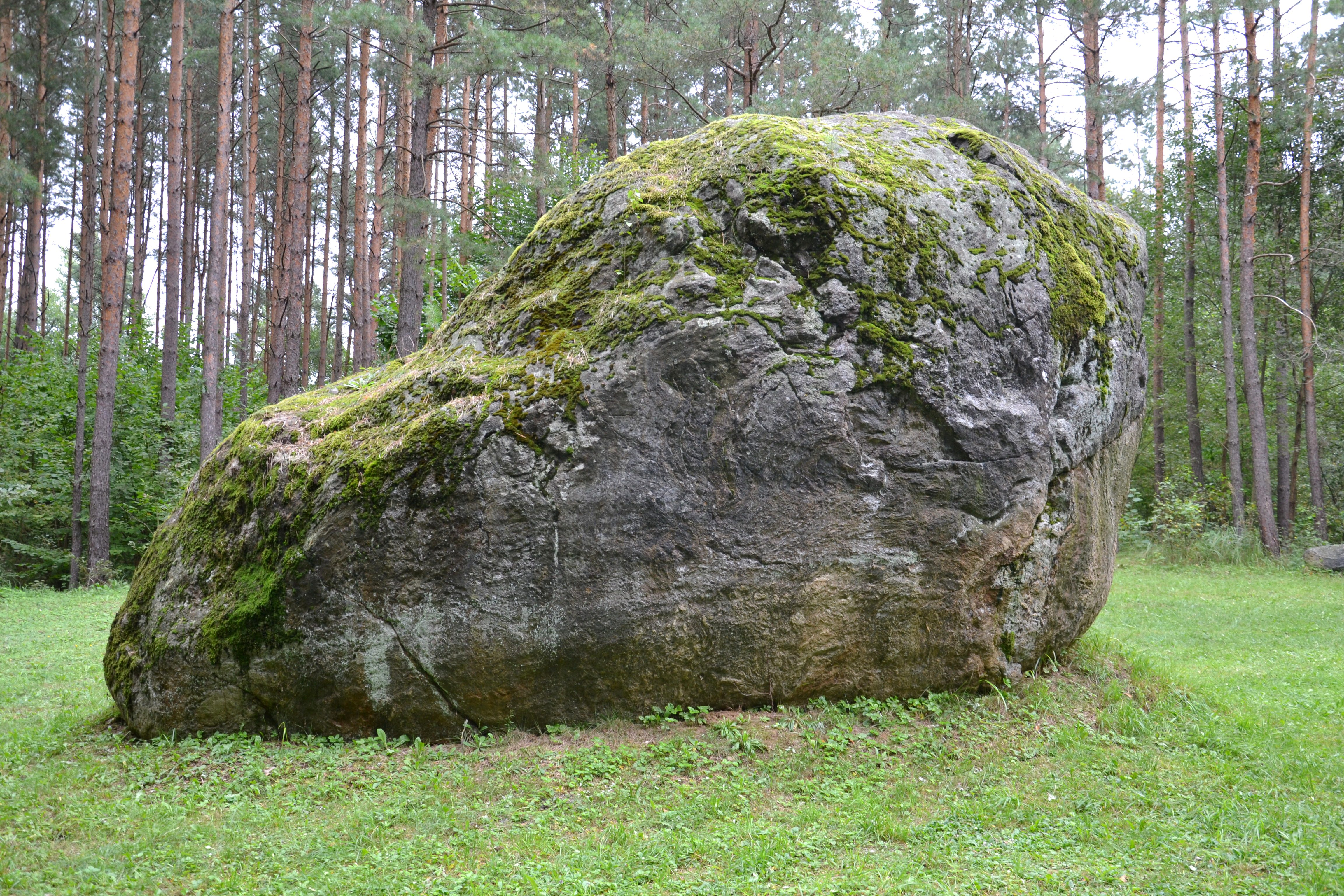 The biggest stone of Dzukija region, Alytus district, Lithuania